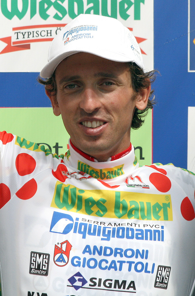 Österreich-Rundfahrt 2009: Leonardo Bertagnolli, Sieger der Gesamt-Bergwertung